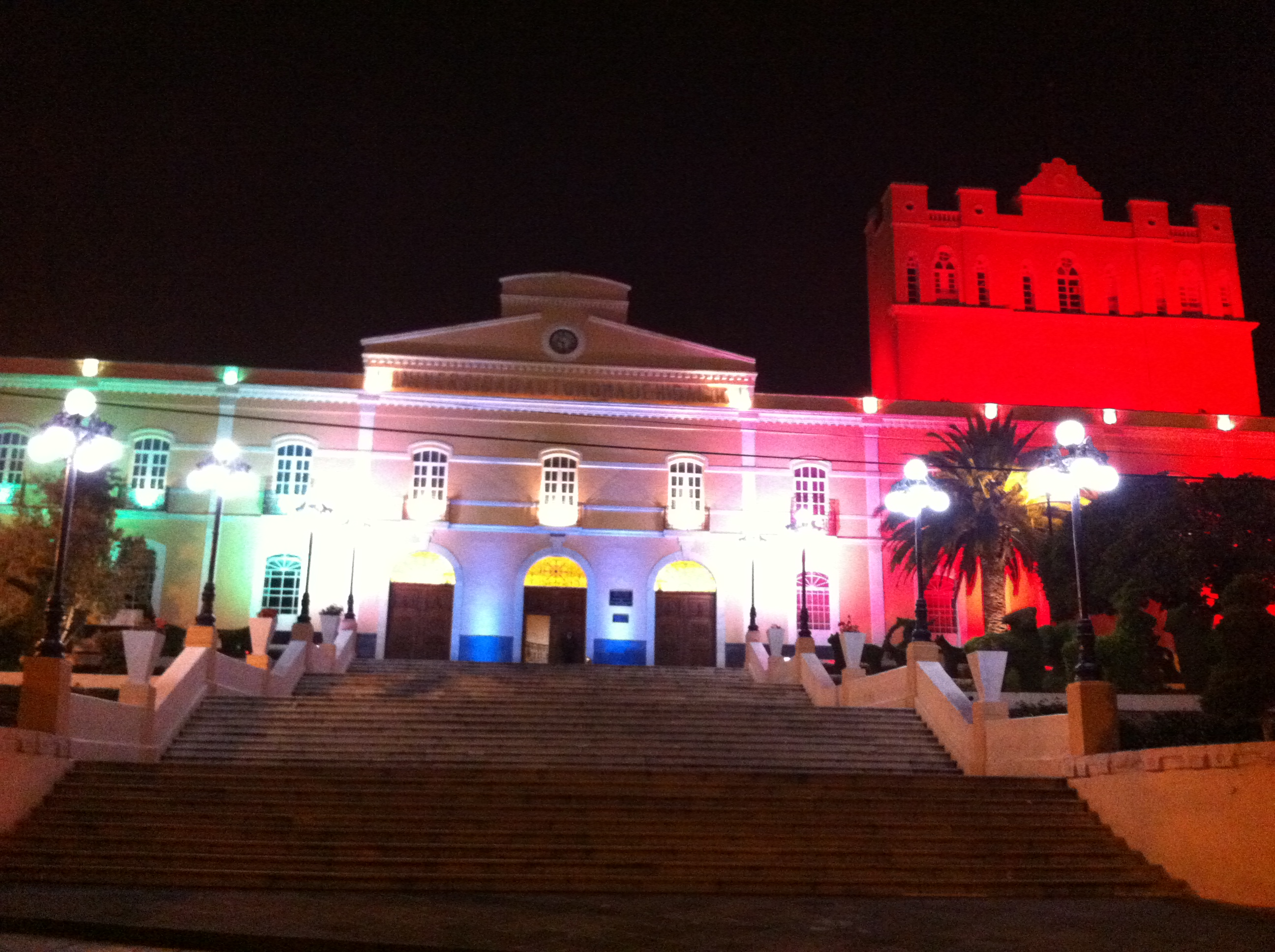 Instituto Científico y Literario (Ex Hospital de San Juan de Dios)